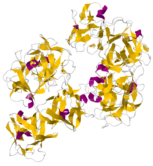 Fascin